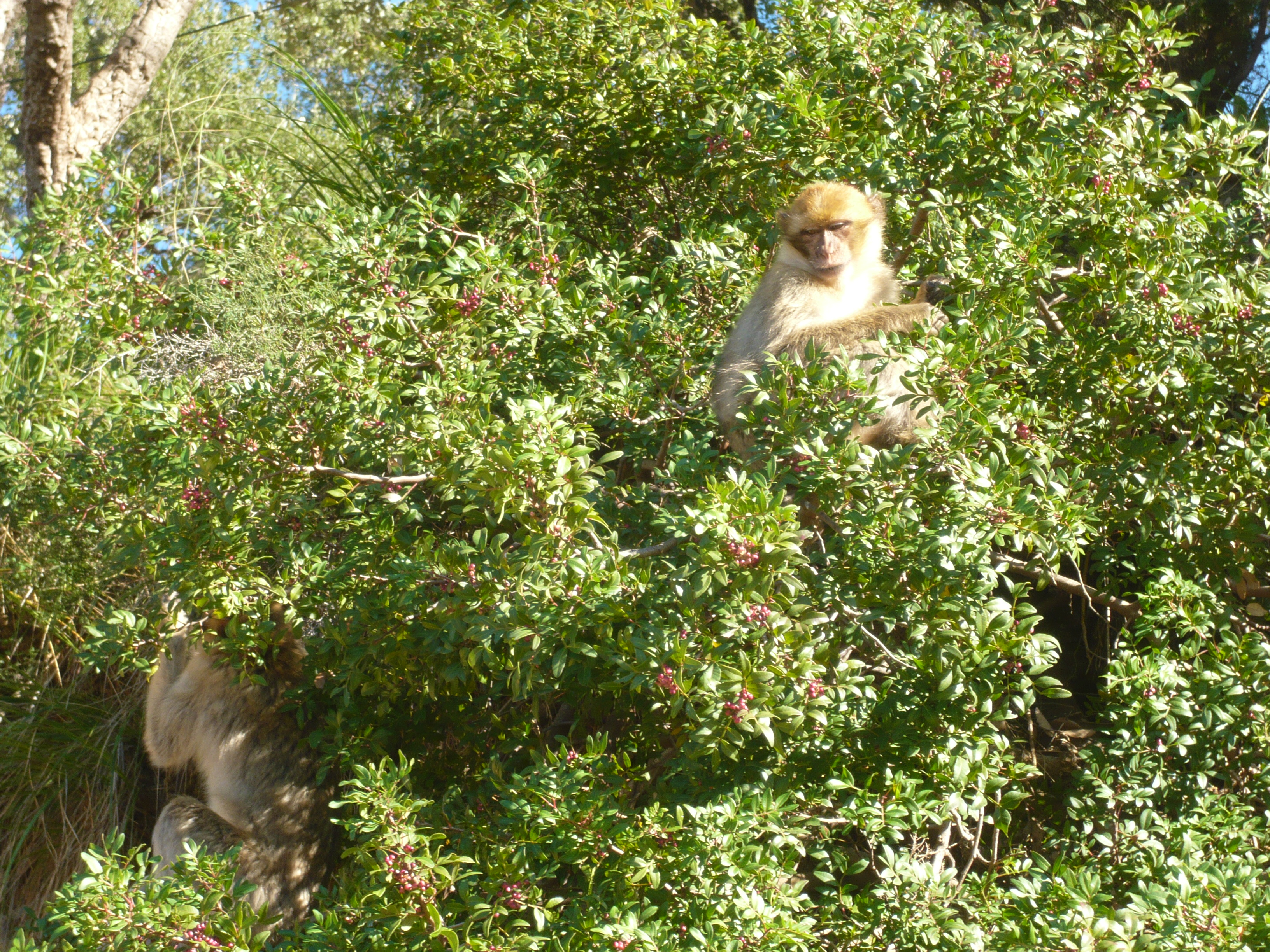 Le Macaque berbère à Tazza, Ziama Mansouriah (Algérie)